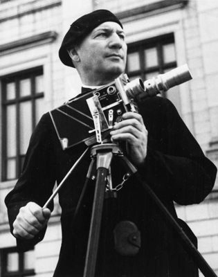 Maurice Proulx avec sa caméra